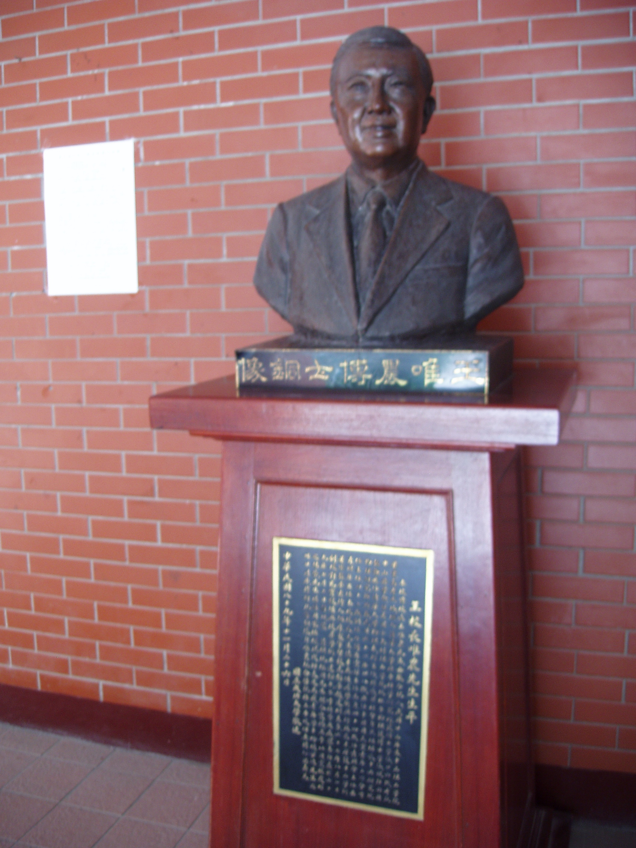 成功大學內王唯農博士塑像。